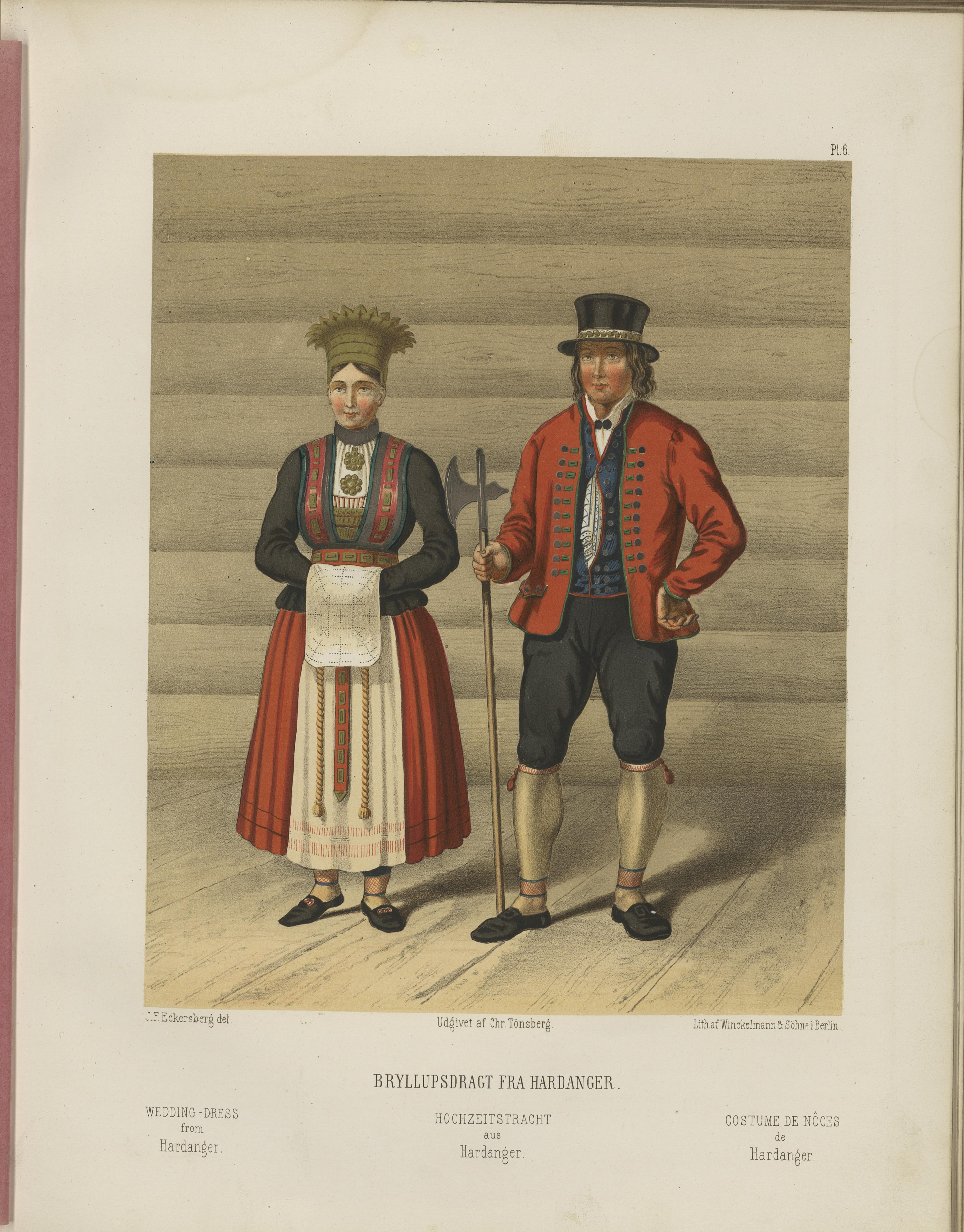 Illustrasjon hentet fra boken "Udvalgte norske Nationaldragter" av ukjent forfatter og utgitt av Chr. Tønsberg (no, [1861])